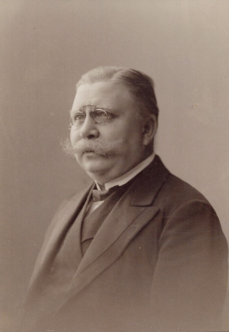 glarmester, oldermand, glasmosaikfabrikant og direktør, Thorvald Peter August Duvier (1860-1928), fotografi af Elfelt